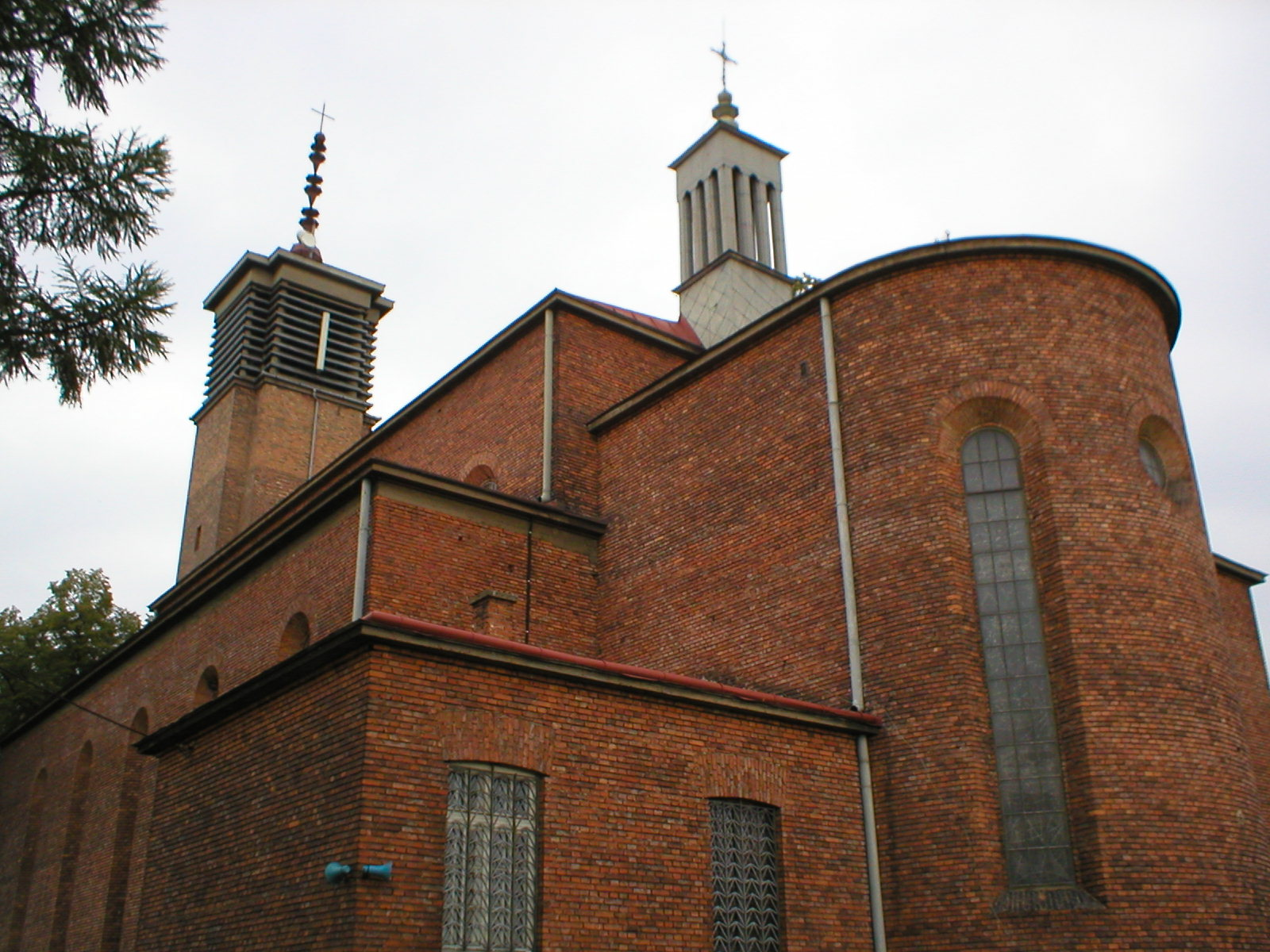 Kościół św. Piotra i Pawła w Leńczach